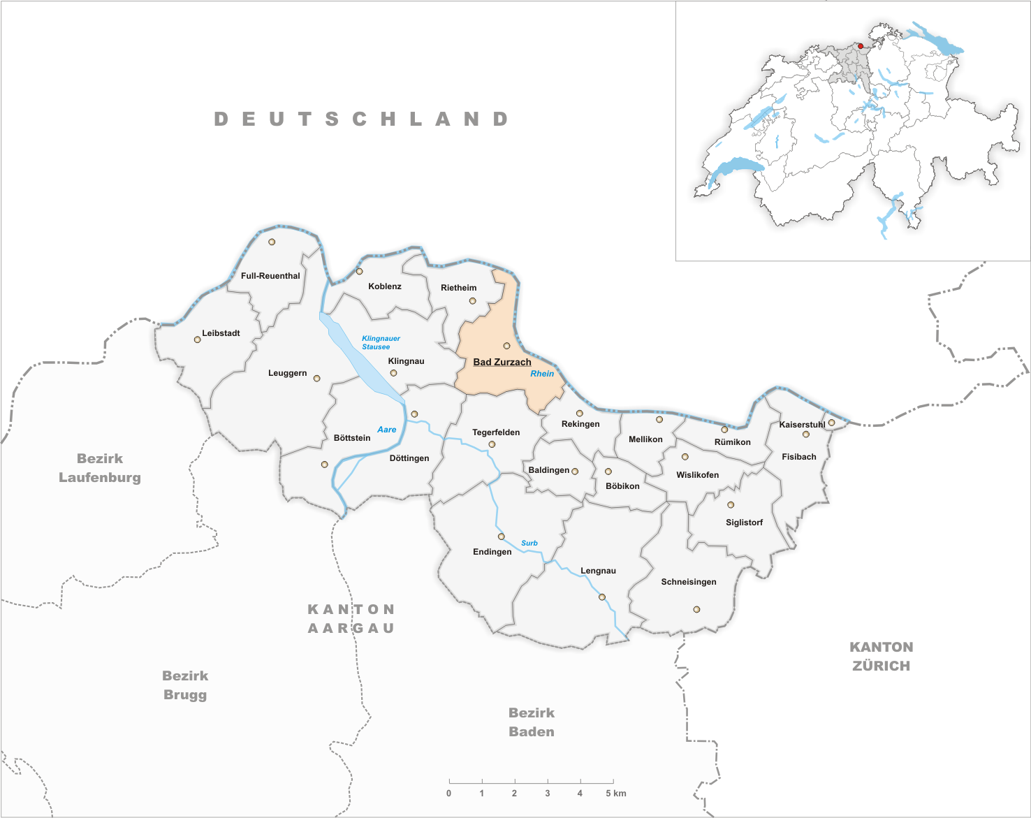 Municipality Bad-Zurzach